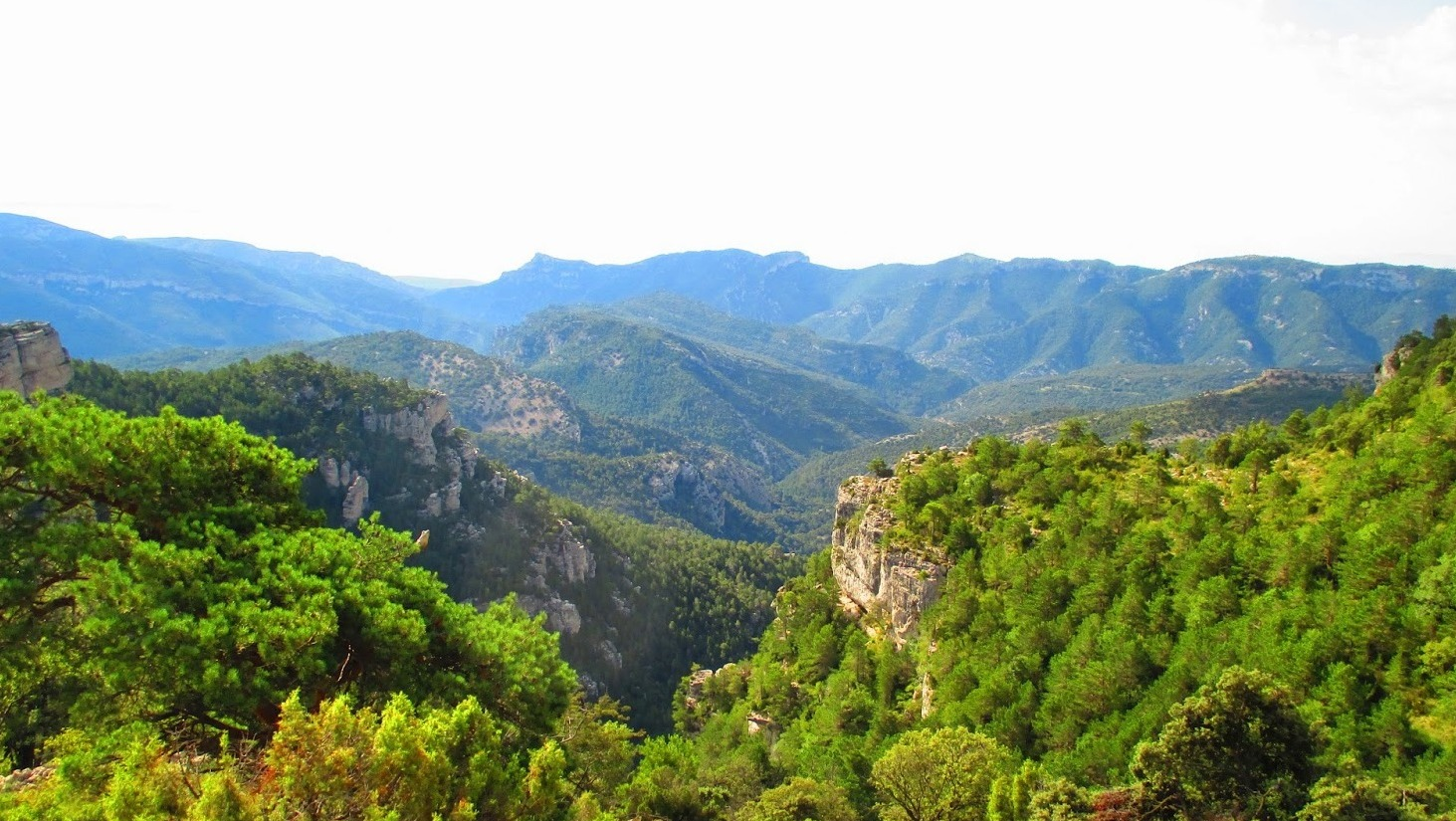 Parque Natural de la Tinença de Benifassà This is a photography of a Site of Community Importance in Spain with the ID: ES5233001. Natura2000 entry, EEA entry